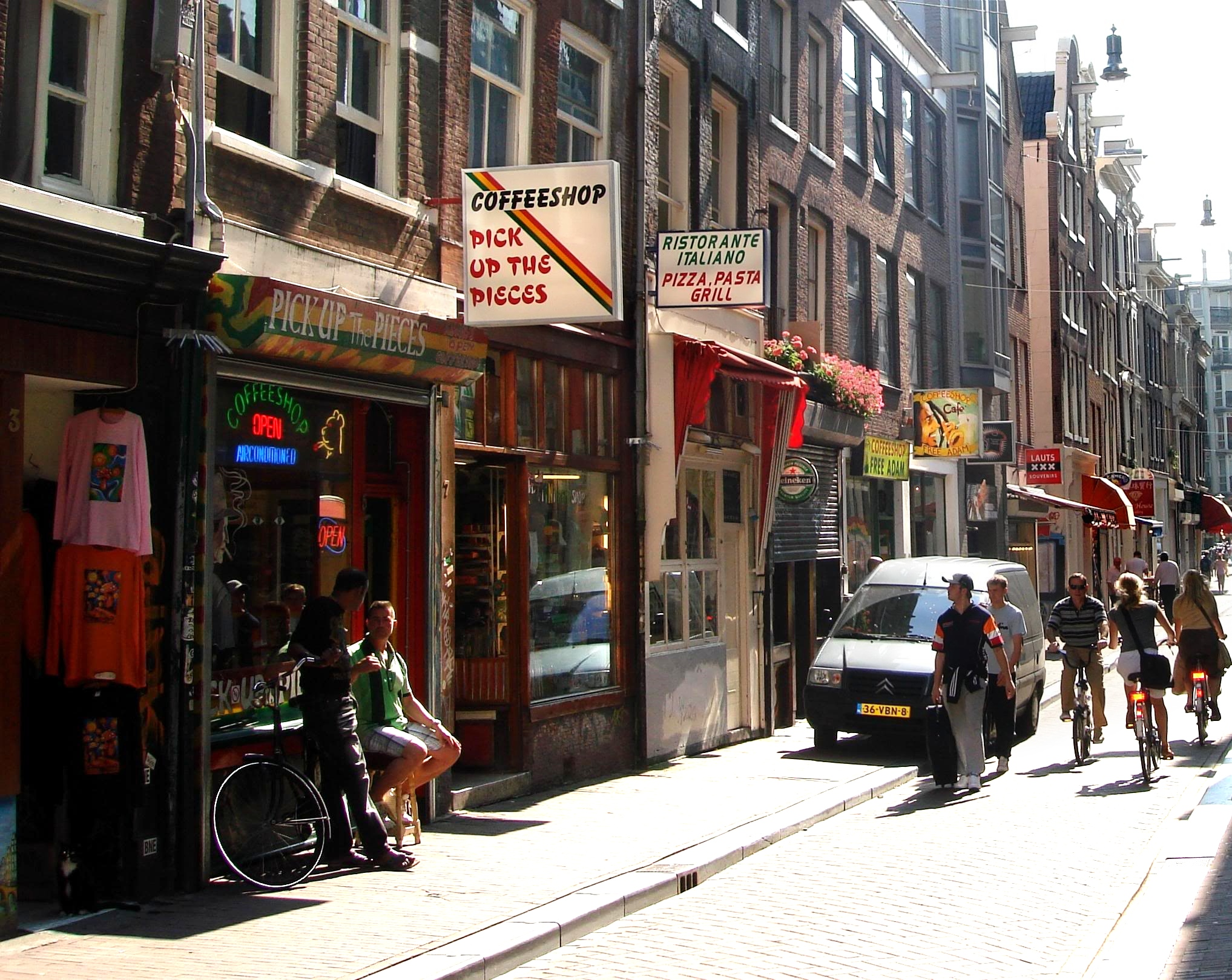 Amsterdam - Oude Hoogstraat , De Wallen